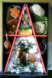 2007年3月3日に限定販売された浜松町駅の駅弁。近隣の文化放送が主導したことから「文化のかほり」と命名。中の仕切りは東京タワーを模している。当時の携帯電話の画像につき低画素数である。